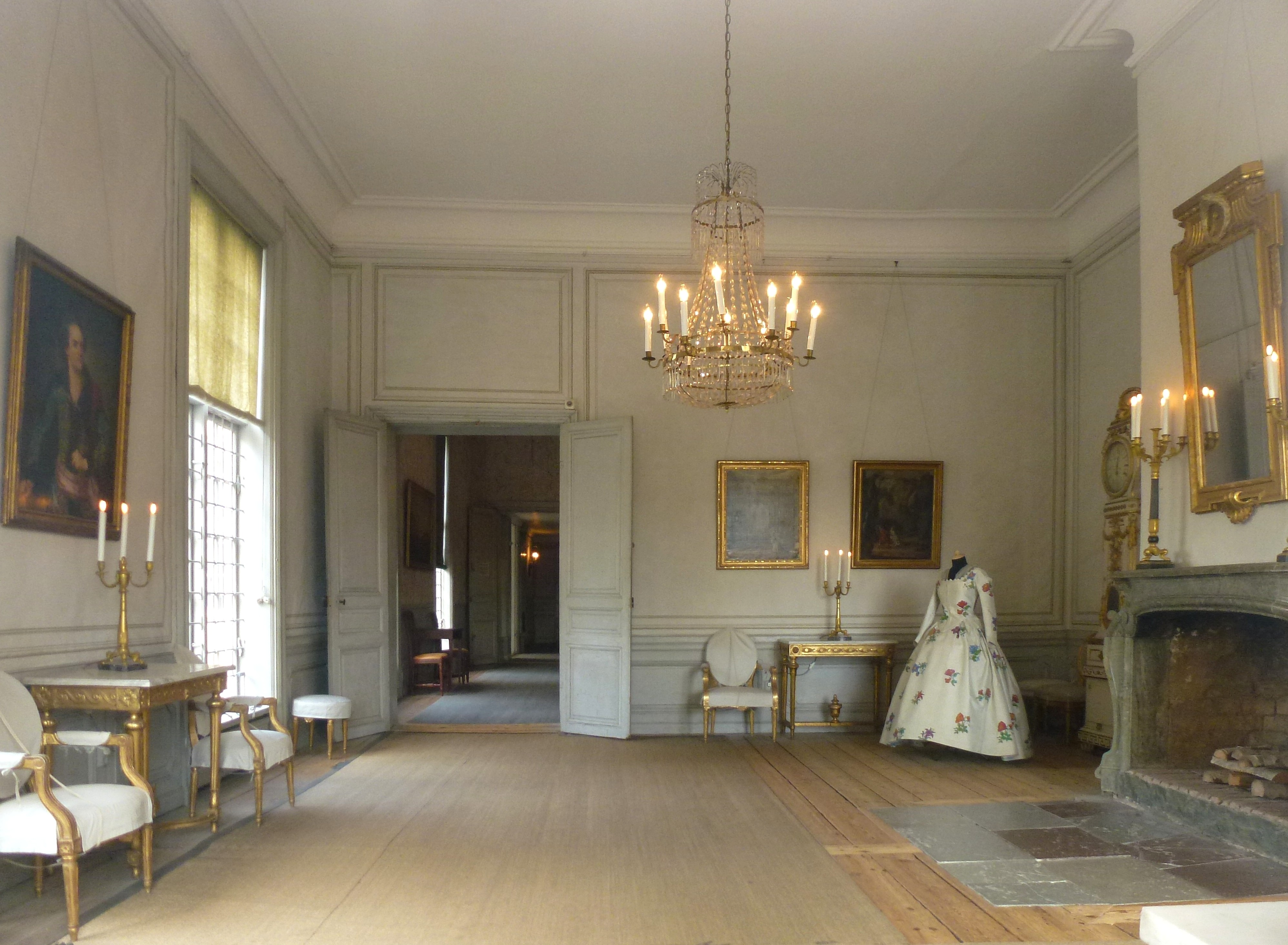 Drottningholms slottsteater salong